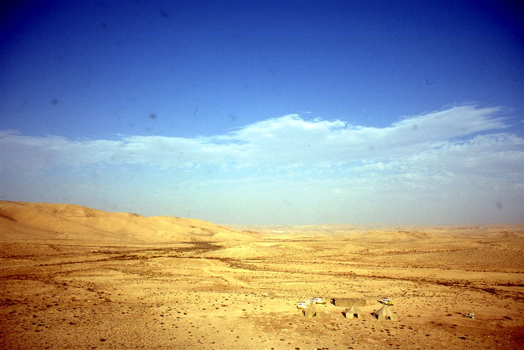 סקר ישראל - מחנה הסוקרים בנחל סרפד בנגב